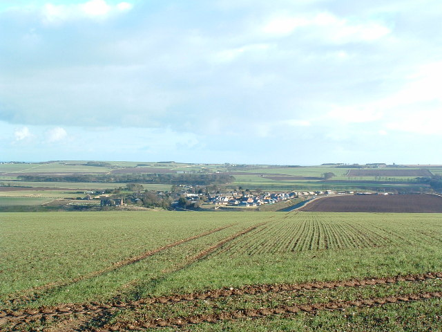 Inverkeilor,Angus